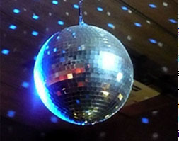 Disco ball in blue